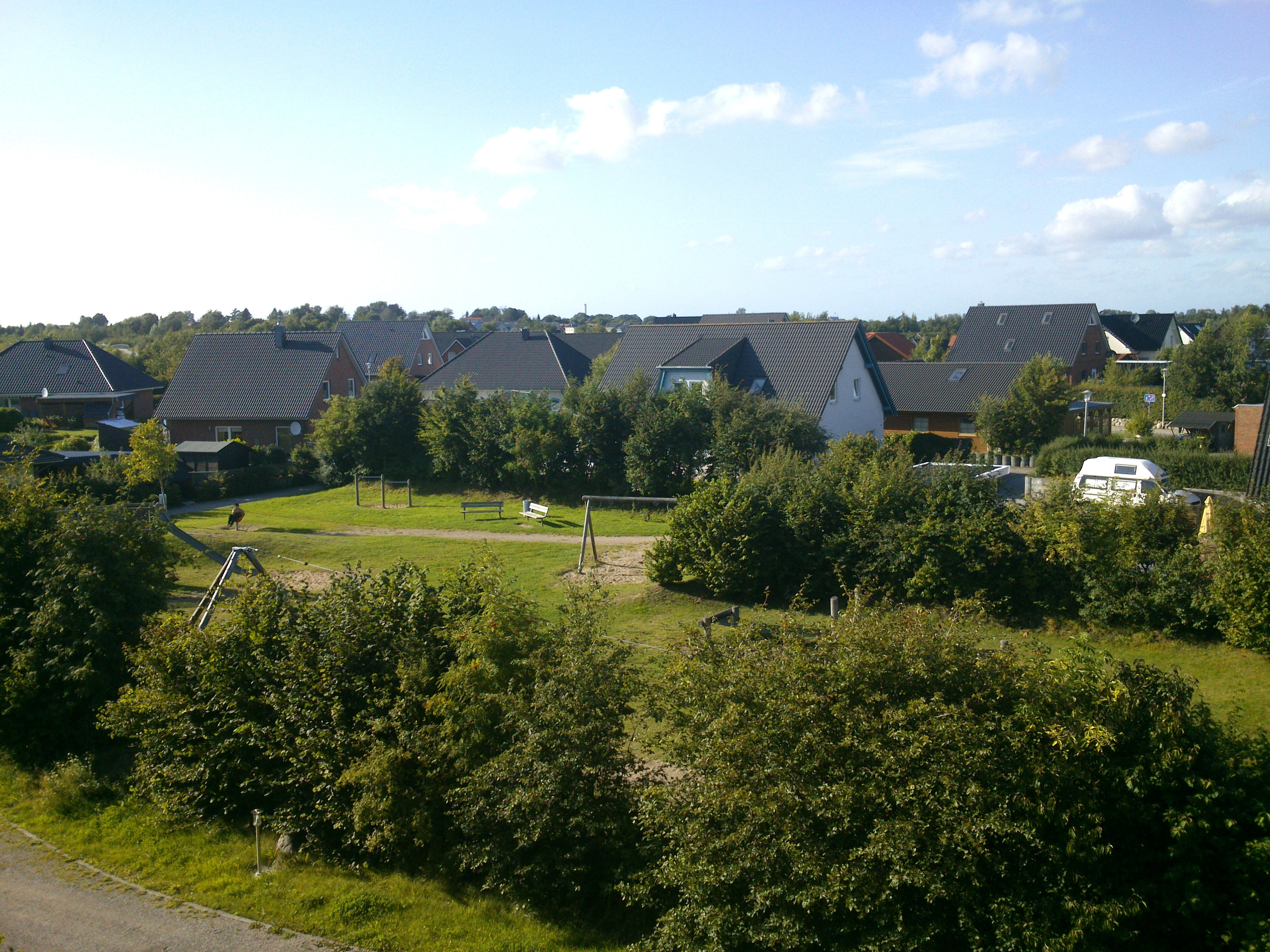 Draufsicht aufd en Spielplatz von Sünderup